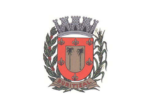 Bandeira da cidade de Buritizal.